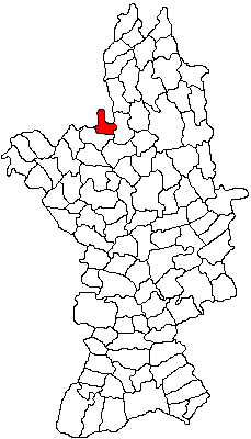 Categorie:Hărţi ale judeţului Olt